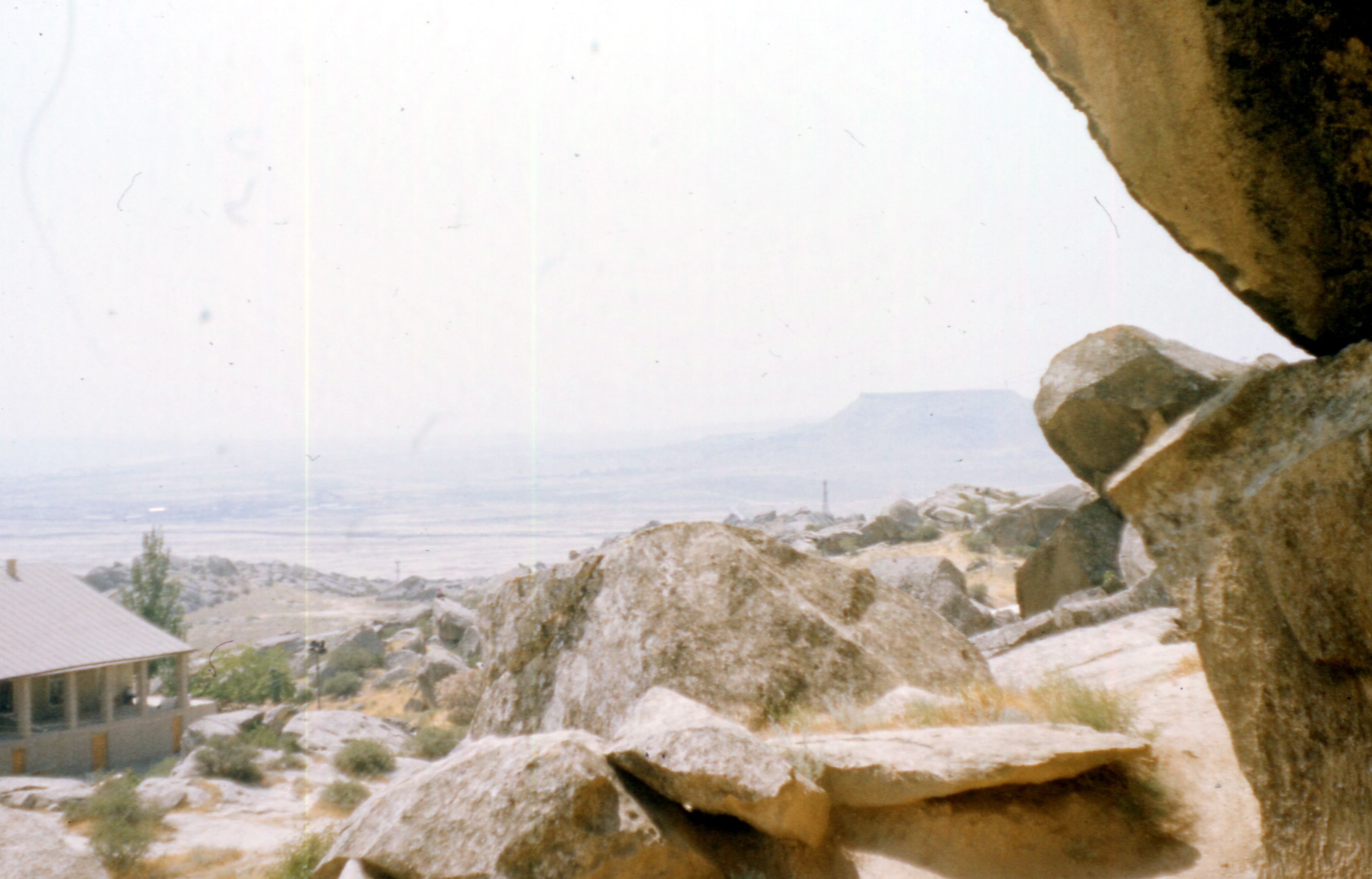 Aserbaidschan 1987